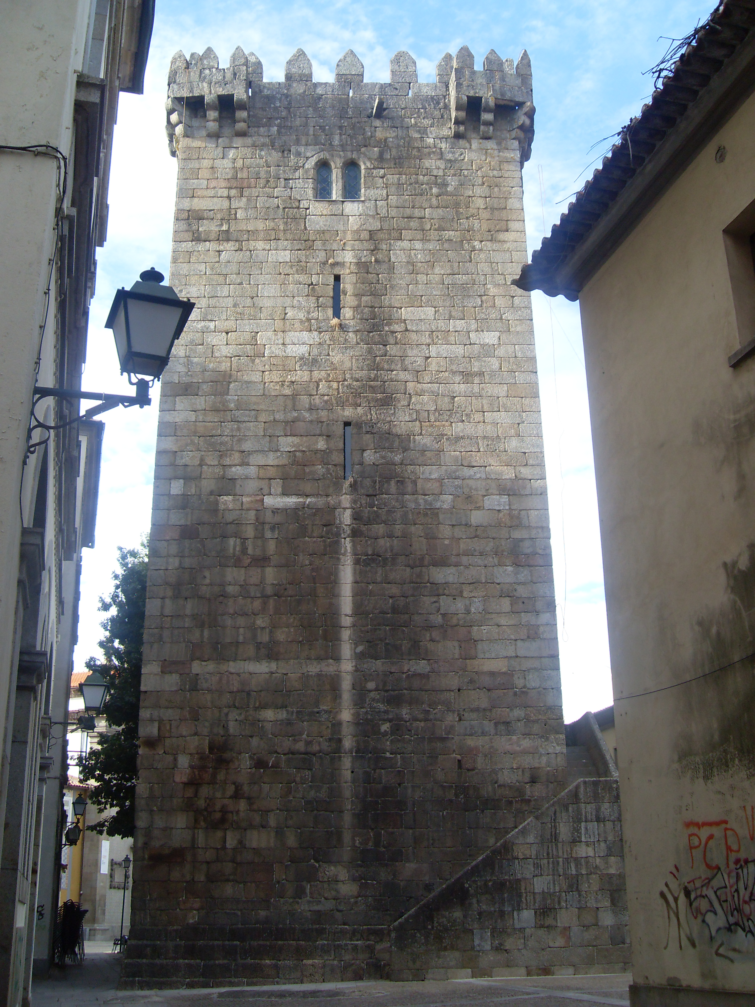 Castelo de Braga, freguesia de São João do Souto, cidade, concelho e distrito de Braga, Portugal: aspecto da torre de menagem.